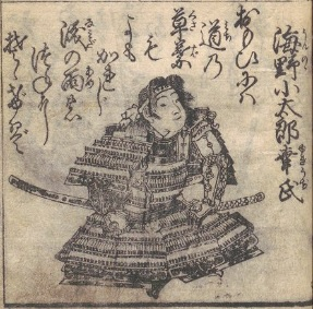 海野幸氏